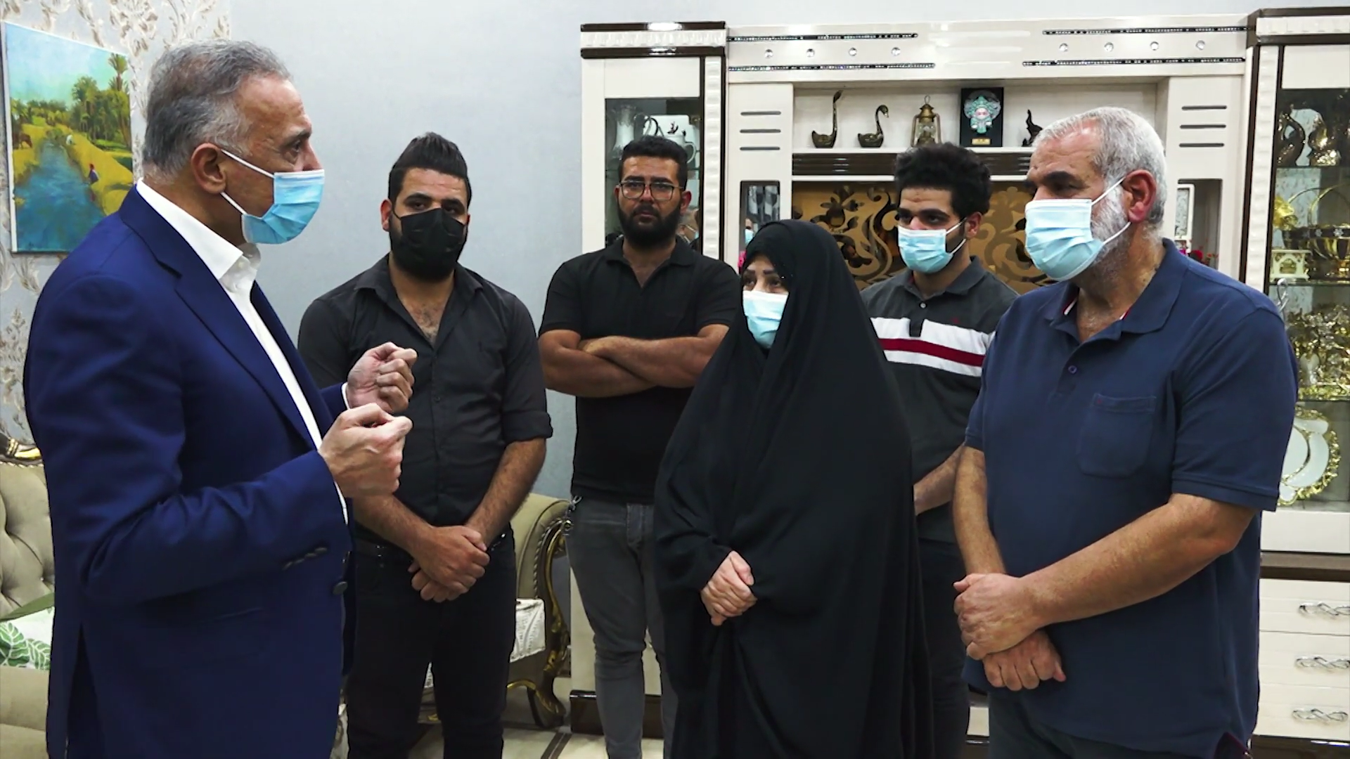 القائد العام للقوات المسلحة، مصطفى الكاظمي، يزور عائلة الشهيدة المغدورة رهام يعقوب في البصرة.